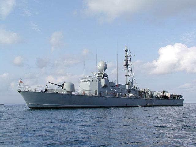 S 62 Falke im Roten Meer